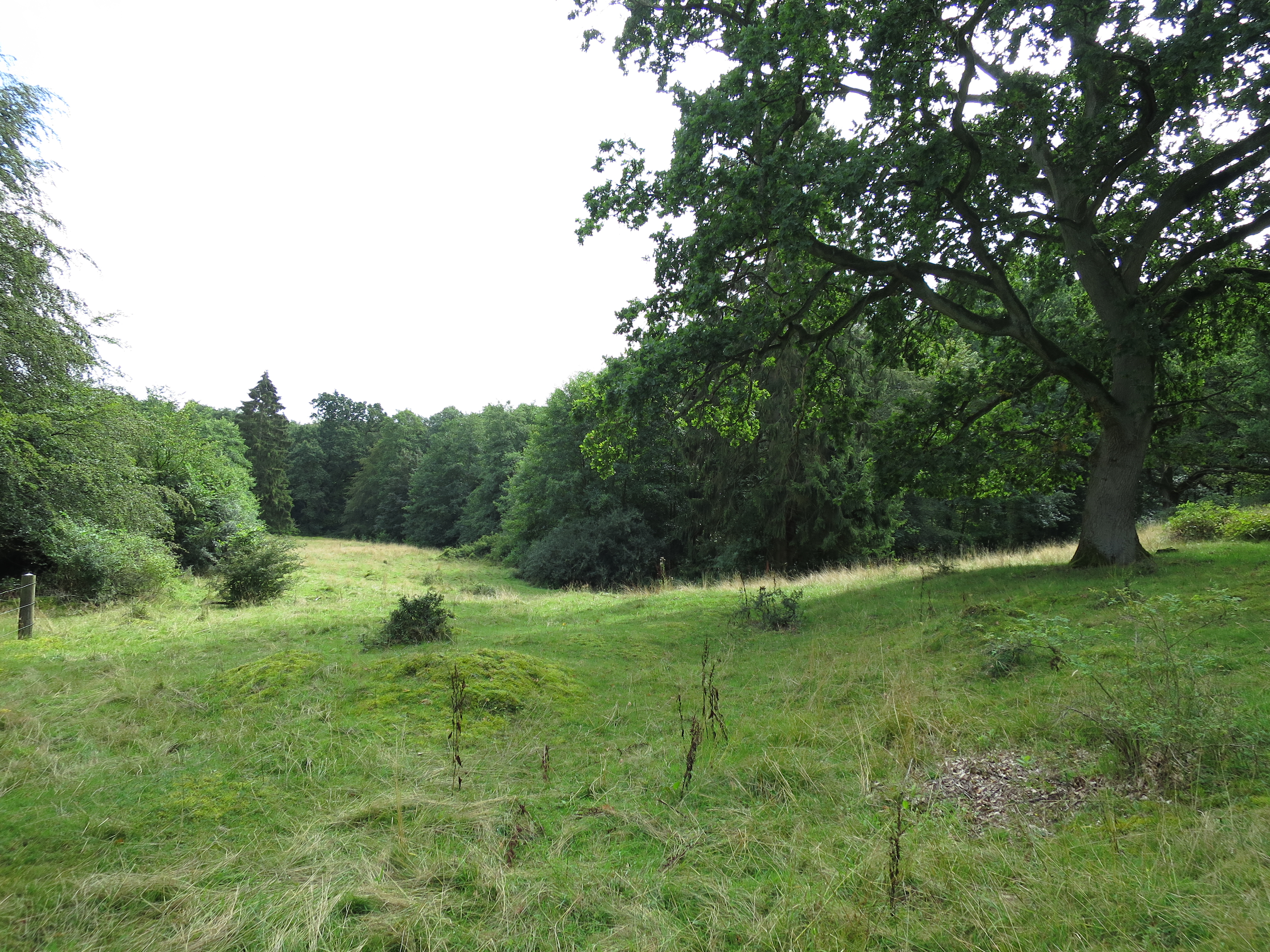 Kulebjerg Overdrev ved Skellebjerg, Sorø Kommune.